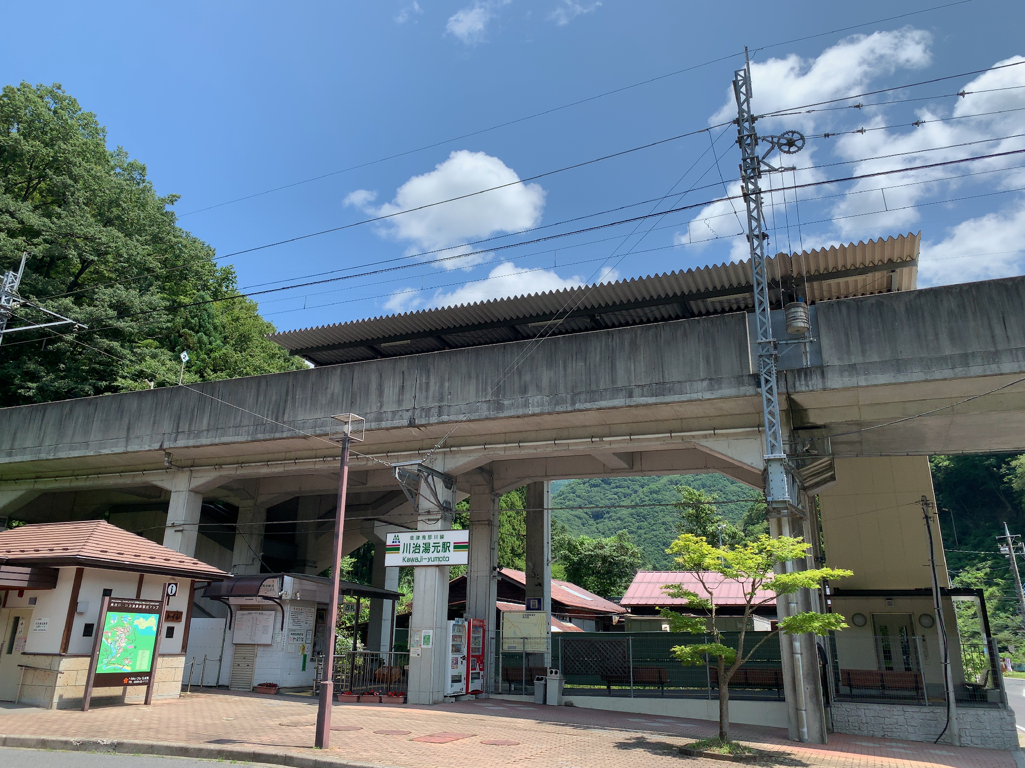 野岩鉄道 川治湯元駅 駅舎